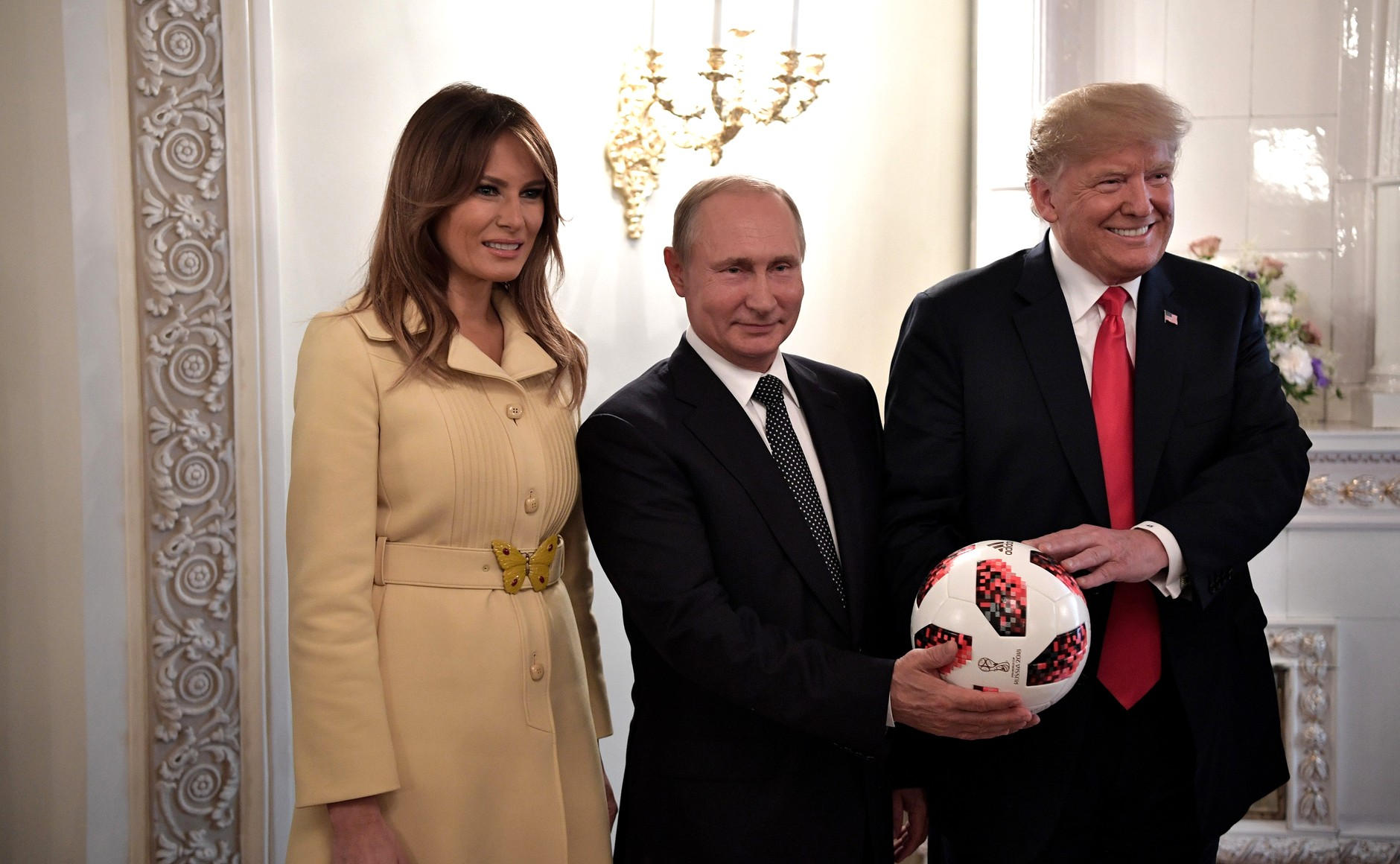 Владимир Путин подарил Дональду Трампу официальный мяч чемпионата мира по футболу 2018 года и пожелал Соединённым Штатам Америки успешно провести ЧМ-2026.